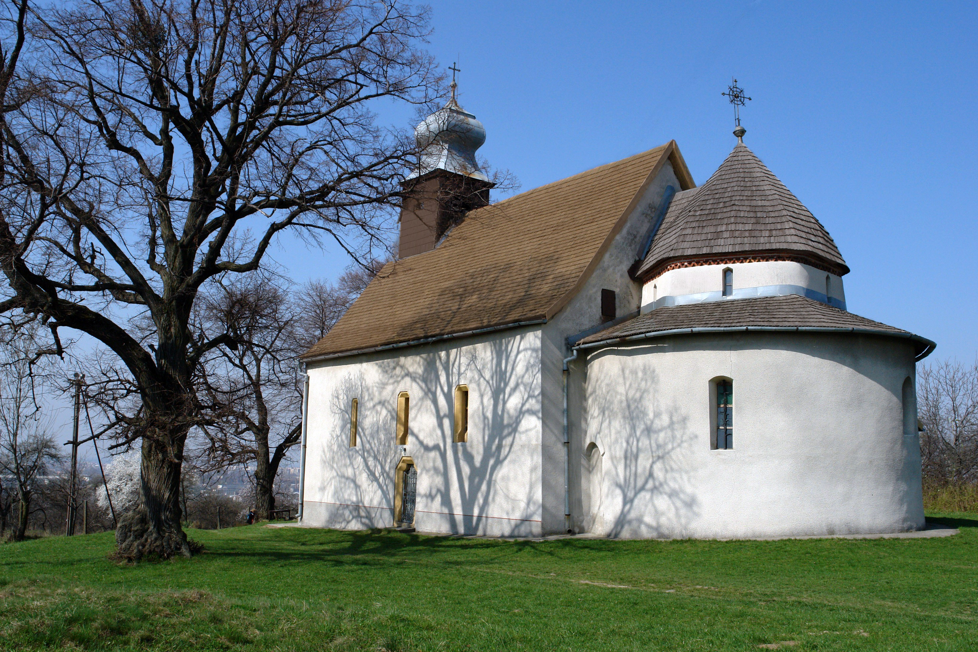 Gerényi rotunda (Szent Anna templom)